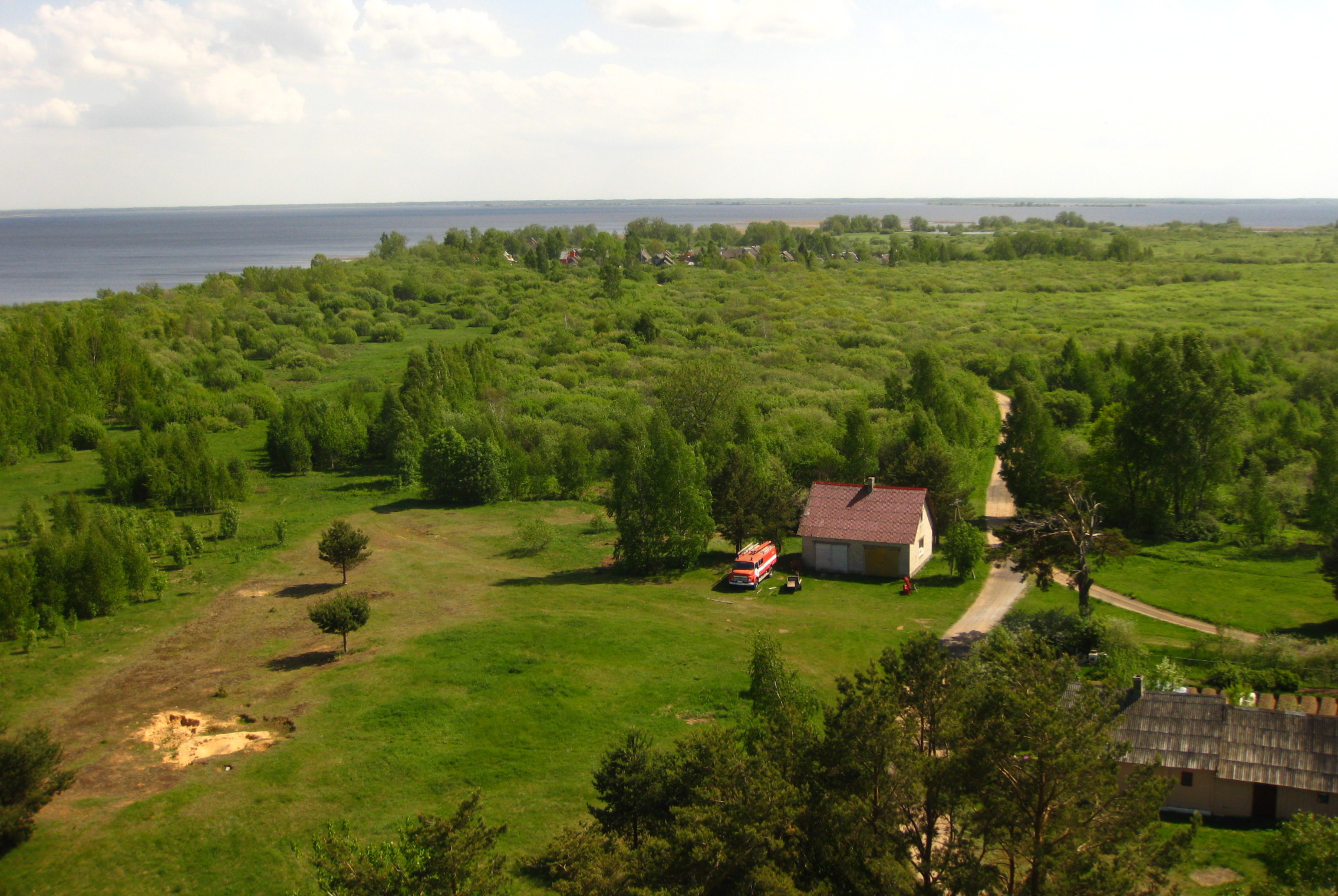 Piirissaare kaguosa, vaade piirivalvetornist, Piirissaare MKA